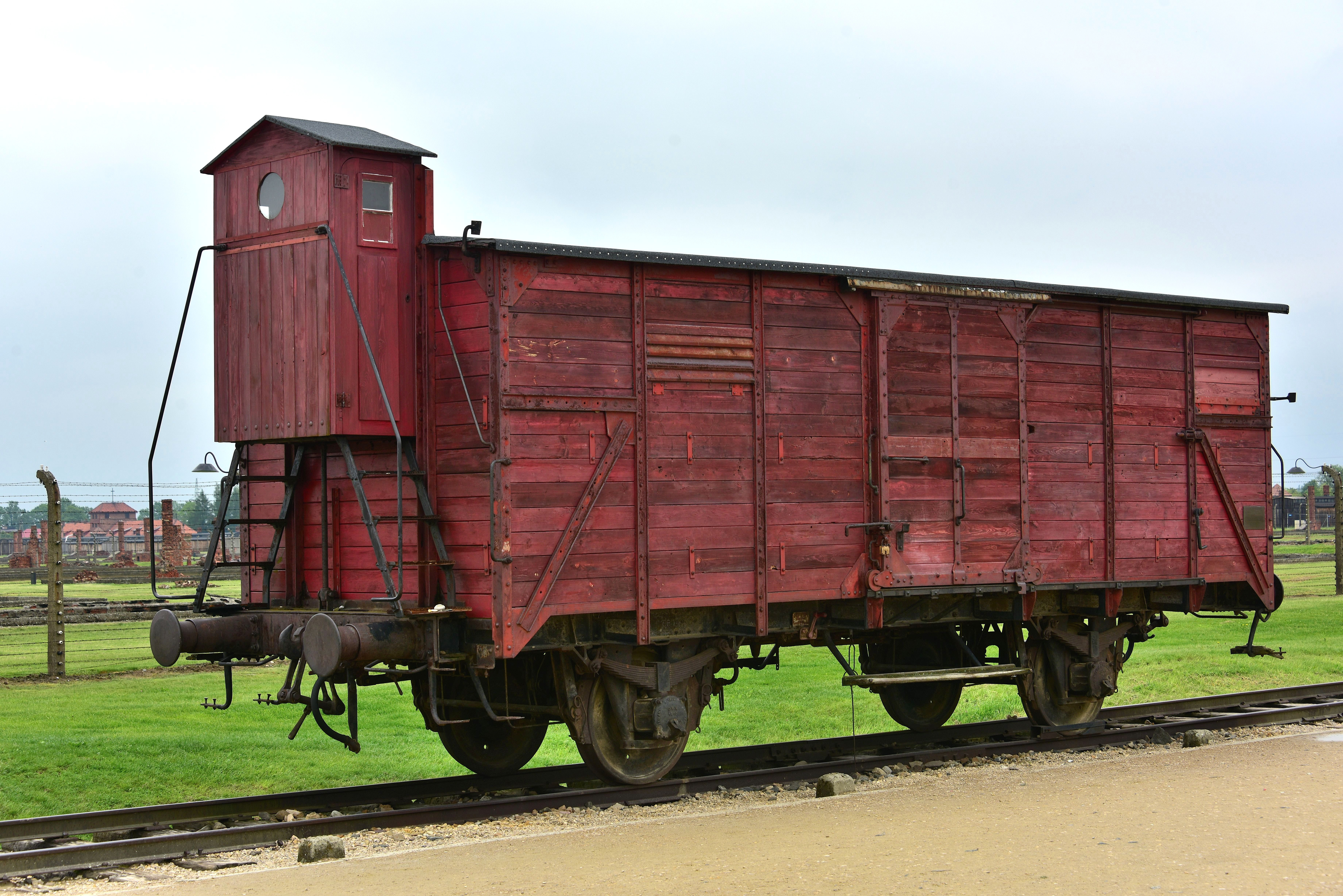 Wagon kolejowy wykorzystywany do deportacji więźniów do obozu Auschwitz-Birkenau na terenie obozu Auschwitz II (Birkenau)